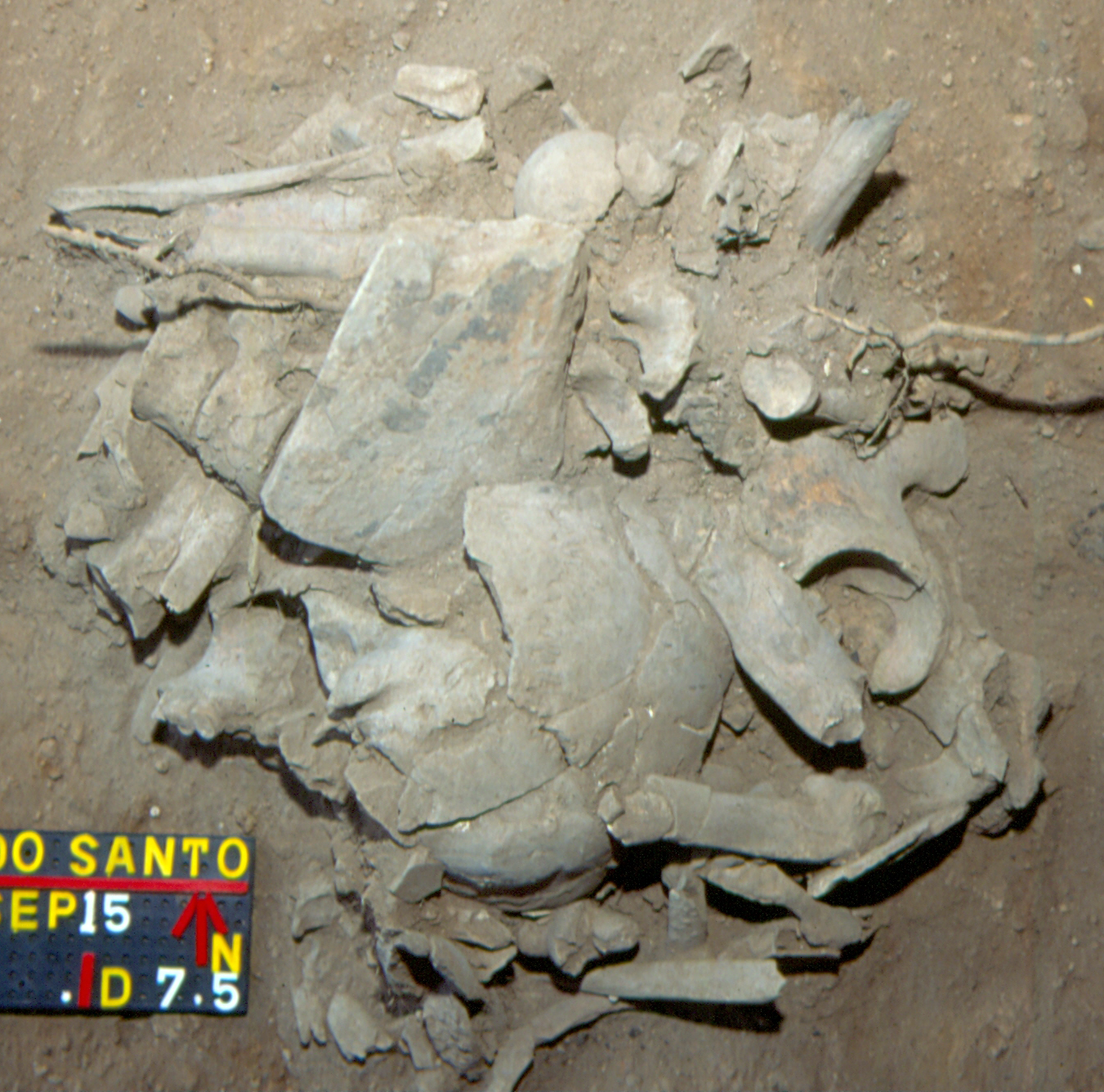 Lapa do Santo - Sepultamento 15 - Foto de Campo da Exposição 4